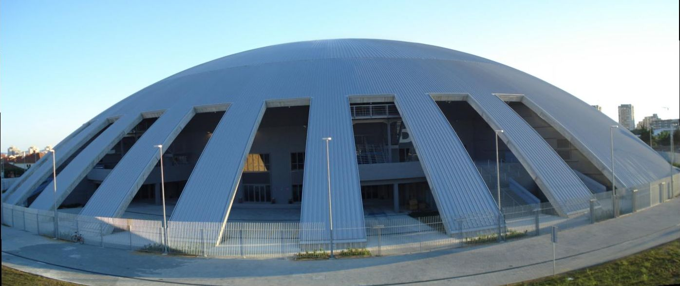 Mehrzweckhalle Dvorana Krešimira Ćosića in der kroatischen Stadt Zadar.